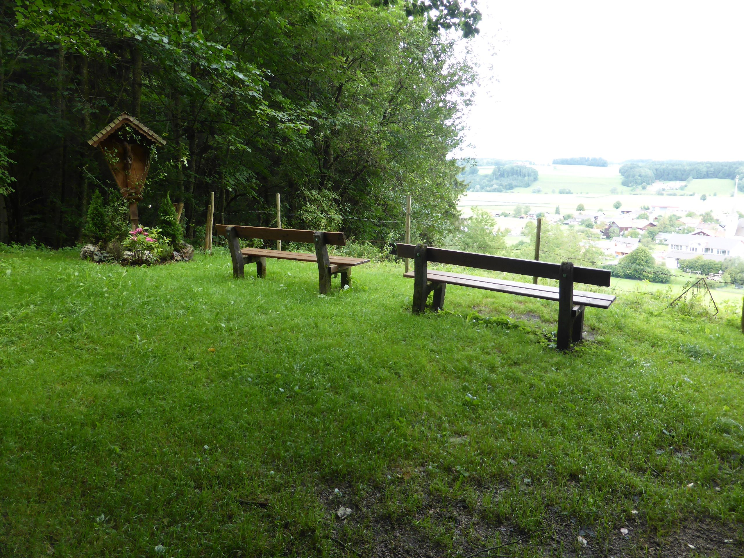 Obertesendorf - Schlossried